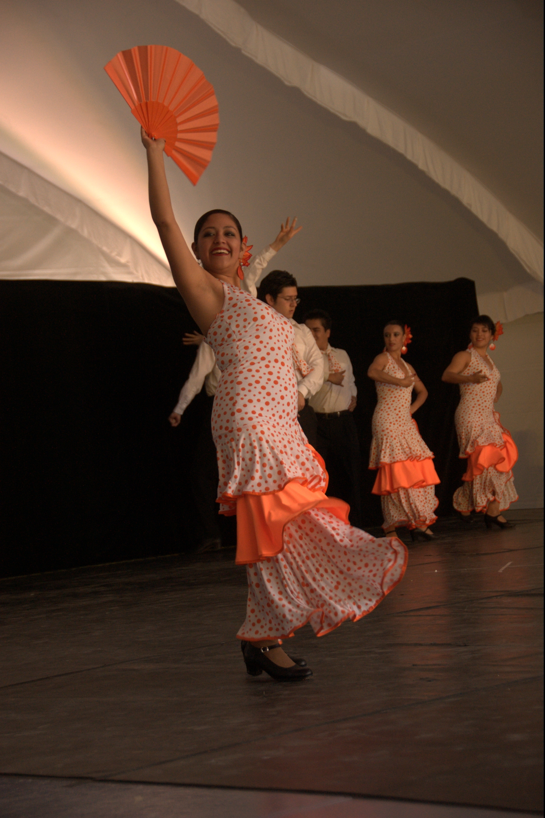 Baile flamenco durante el evento Semana de la Cultura en ITESM Campus Ciudad de México